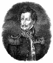 Портрет Владимира Ивановича Левенштерна